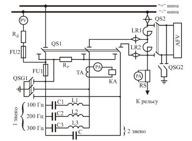 схема